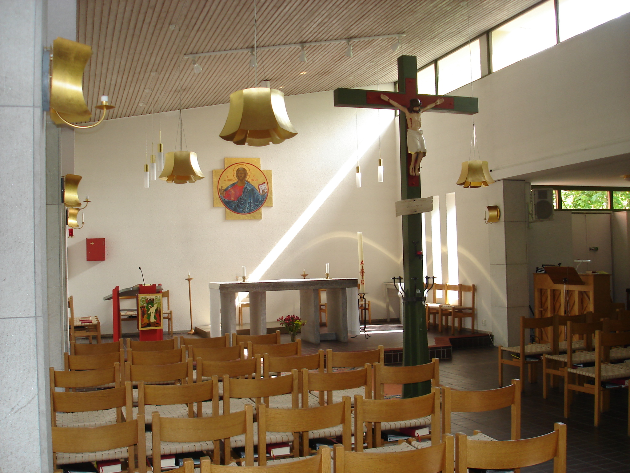 Sankt Ansgars kyrka, Uppsala, Invändigt